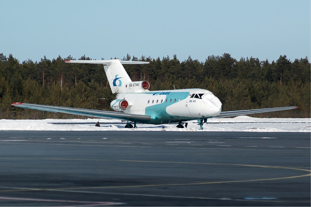 Skol Airlines Yakovlev Yak-40